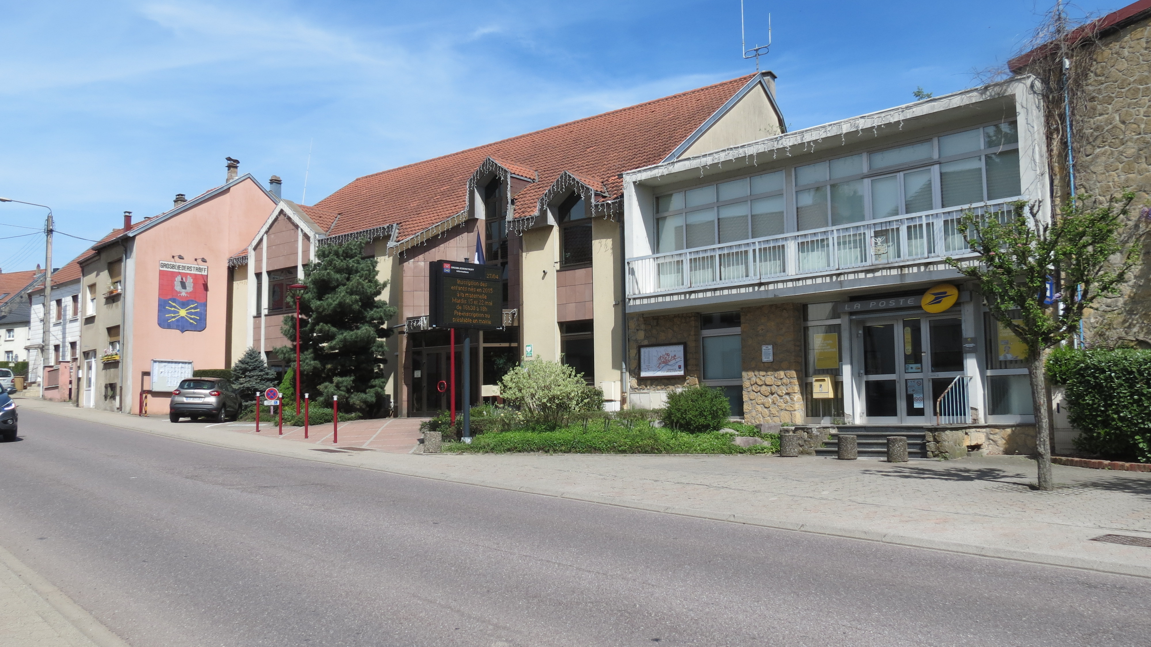 Mairie et Poste de Grosbliederstroff.